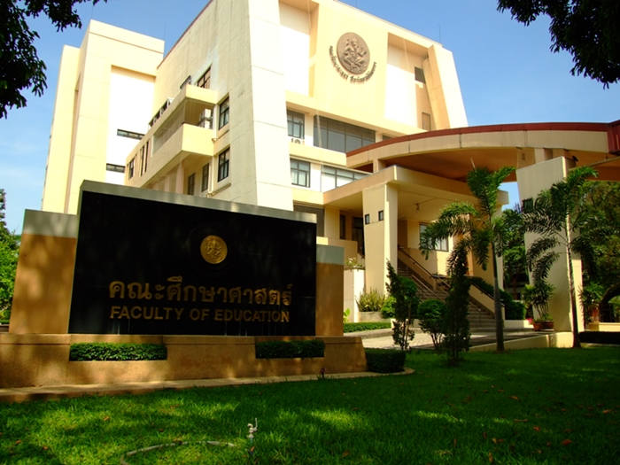 อาคารศึกษาศาตร์ 3